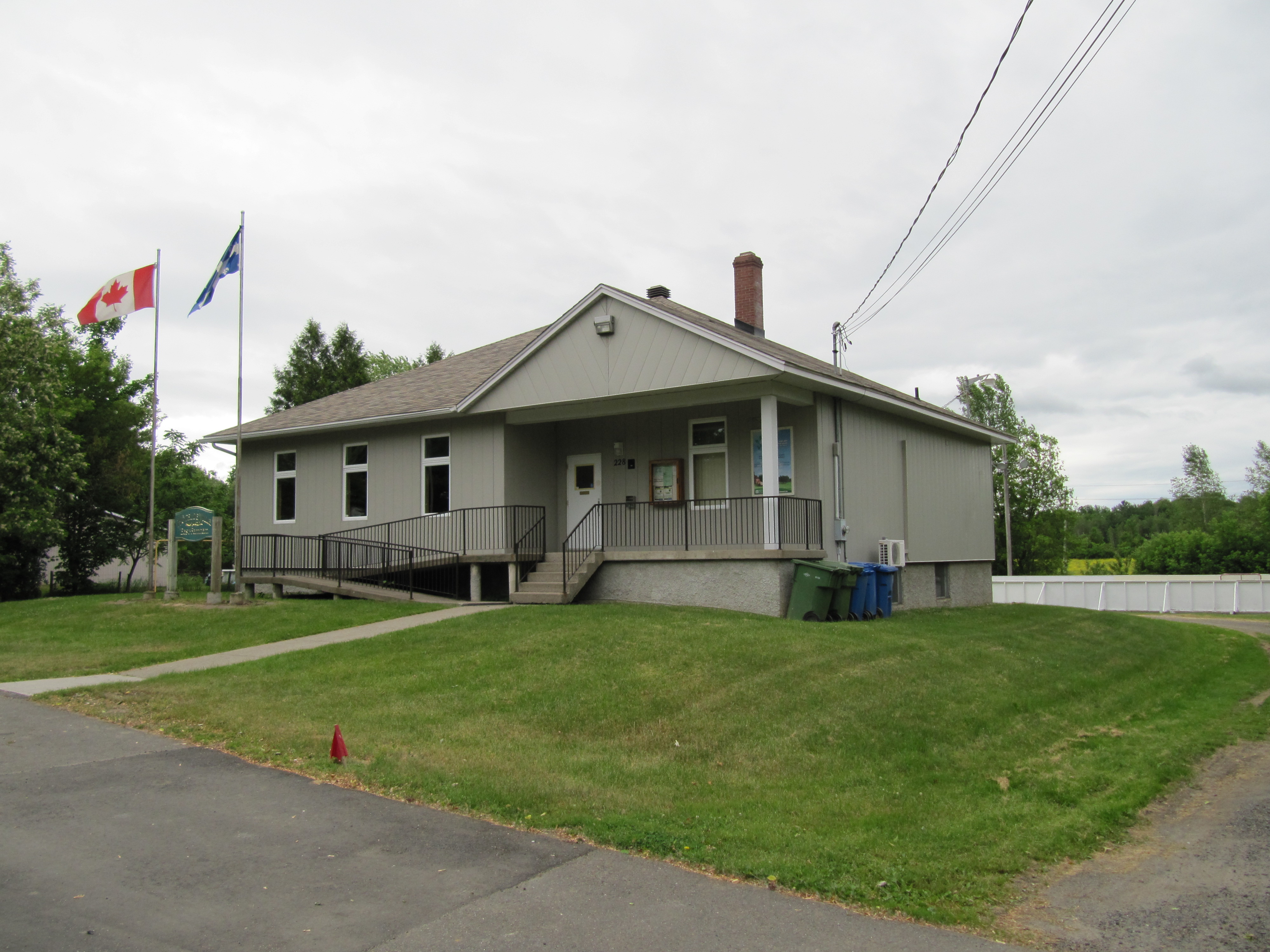 Hôtel de ville d'East Farnham